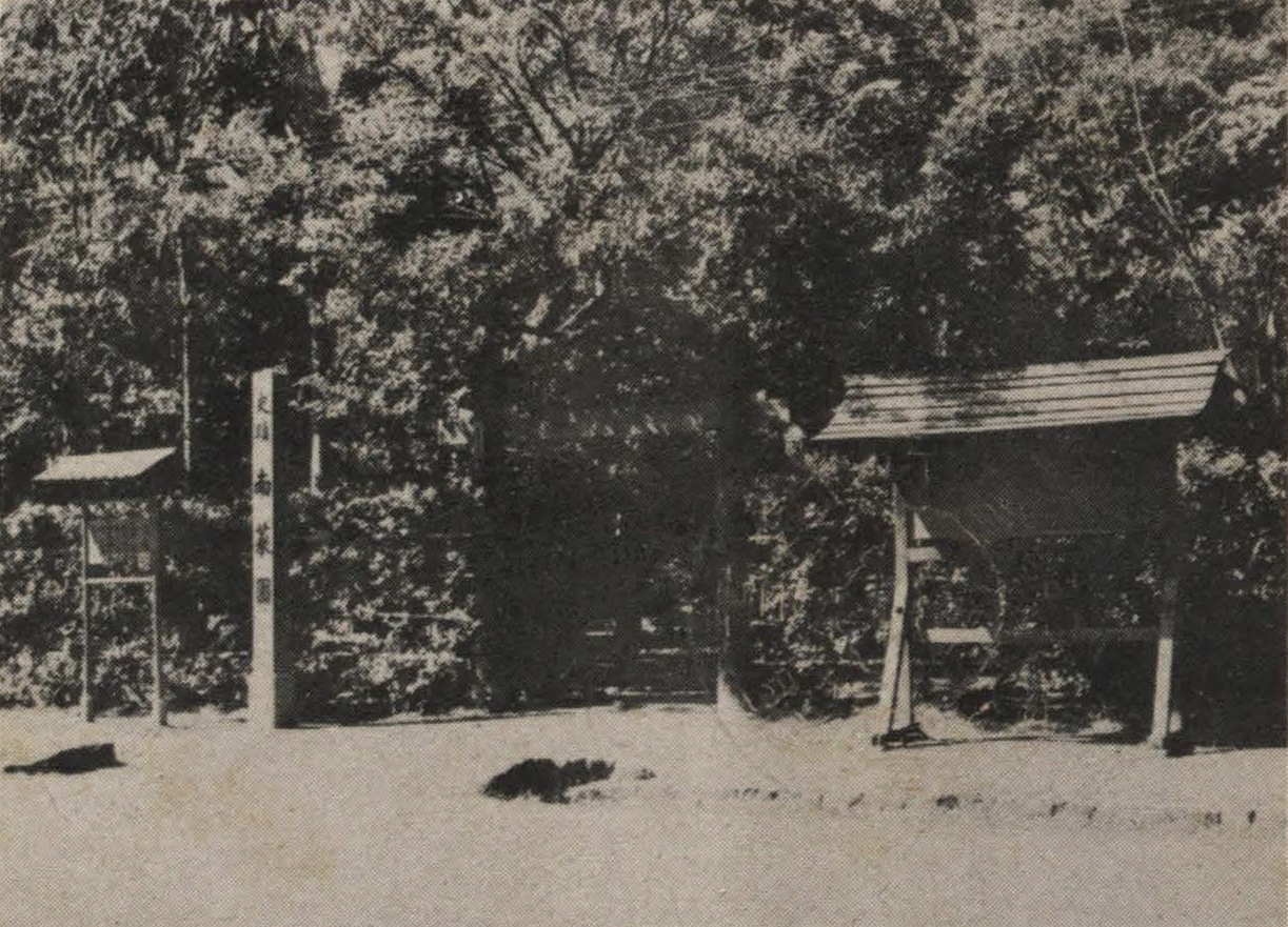 中文（台灣）: 台北市的南菜園為兒玉源太郎的宅邸，1896年6月落成，1941年被列為史蹟。